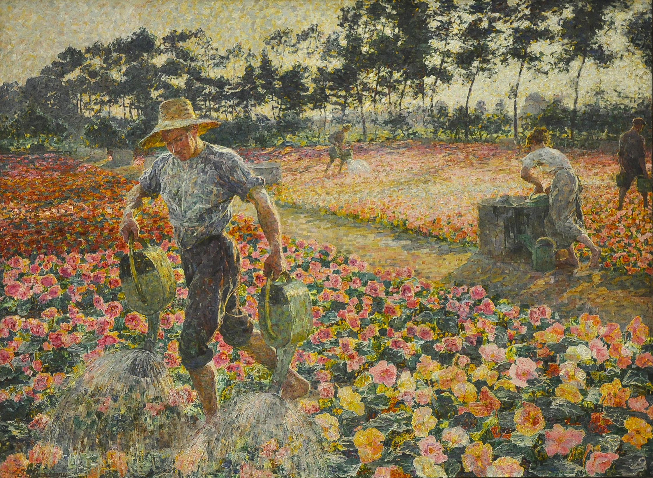 Jenny Montigny (1875-1937) De tuinier MSK Gent Wikidata has entry Q21675372 with data related to this item.